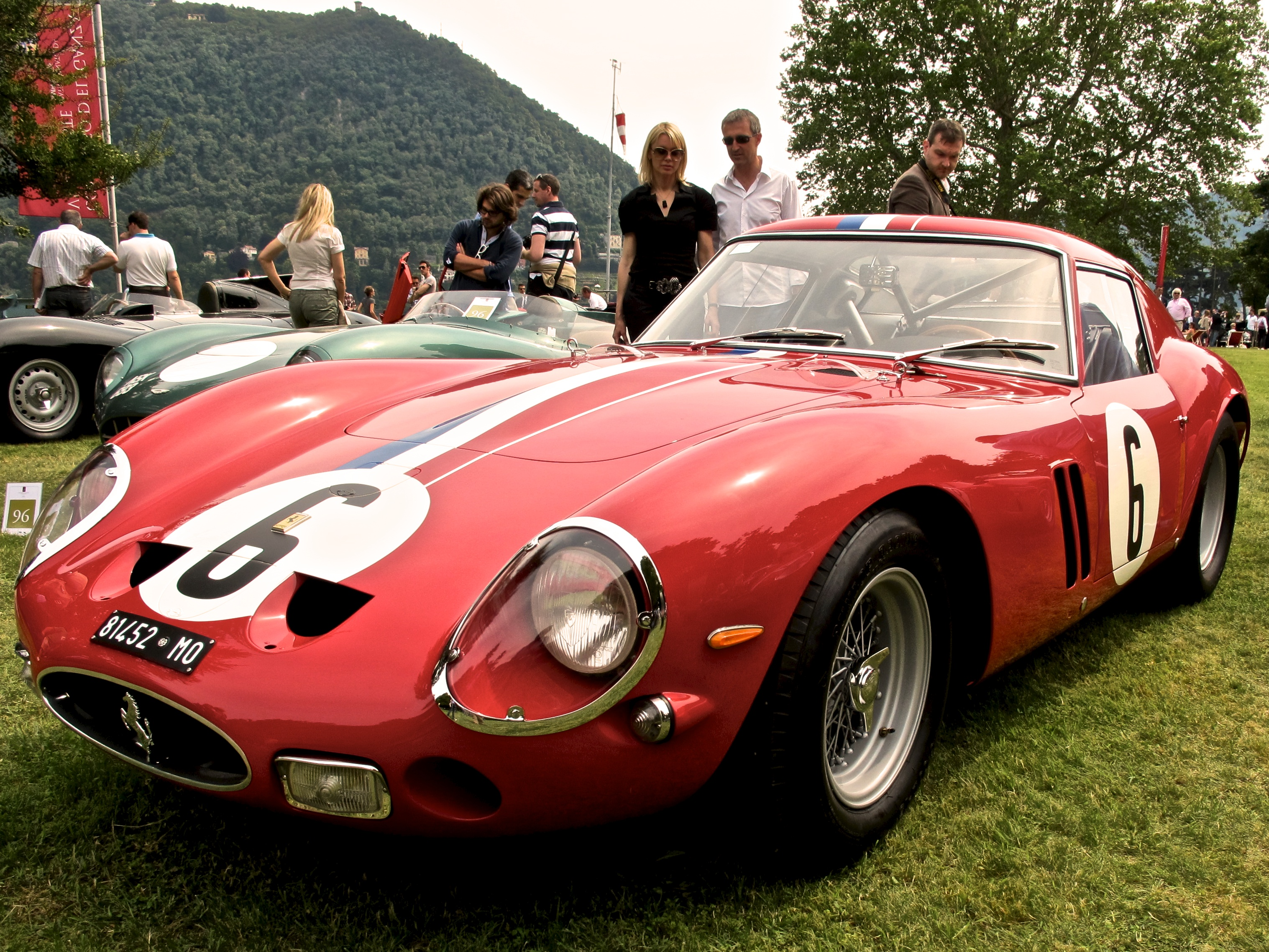 Ferrari 250 GTO at concorso d'eleganza villa d'Este 2012